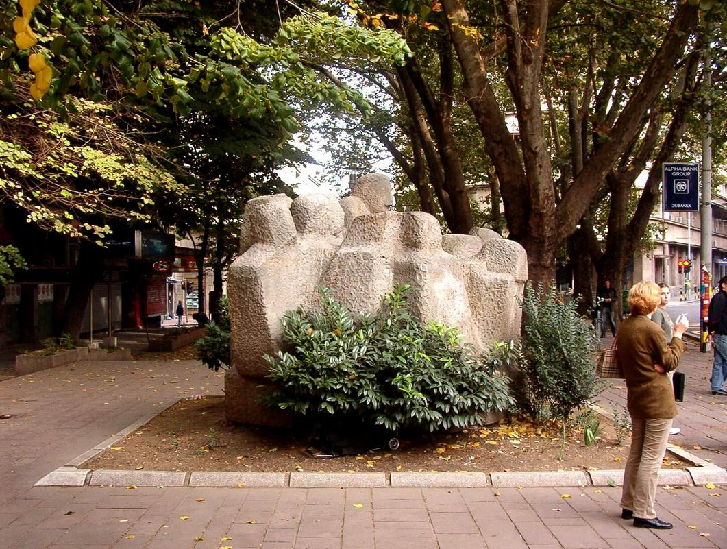 Fotografisao Goldfinger. U javnoj upotrebi!